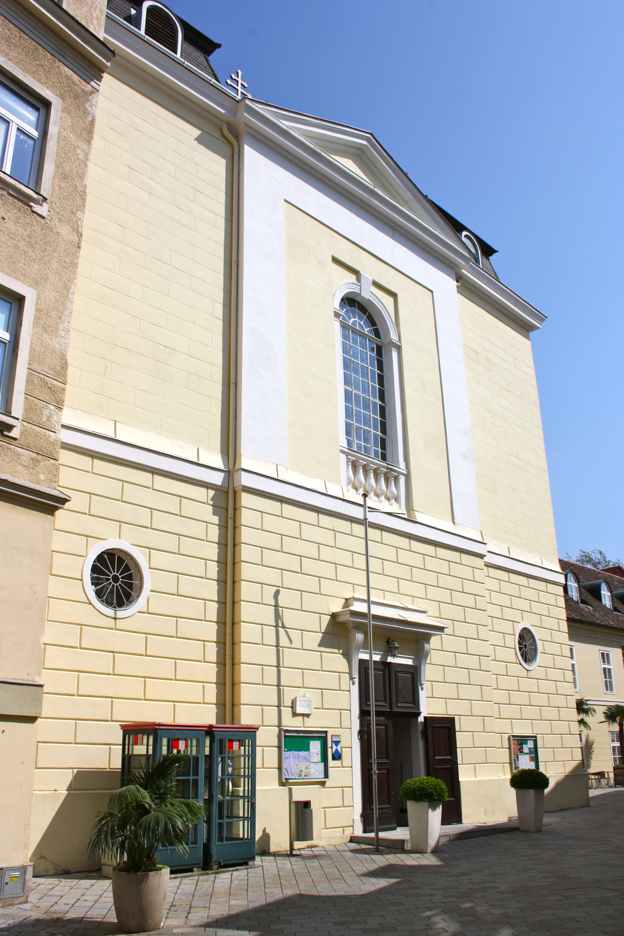 Frauenkirche